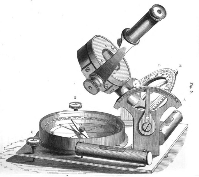 Dipleidoscopio de Edward John Dent (1790–1853) Imagen de su obra: Título A Description of the Dipleidoscope, Or Double-reflecting Meridian and Altitude Instrument: With Plain Instructions for the Method of Using it in the Correction of Time-keepers, Volumen 7 A Description of the Dipleidoscope, Or Double-reflecting Meridian and Altitude Instrument: With Plain Instructions for the Method of Using it in the Correction of Time-keepers, Edward John Dent Autor Edward John Dent Edición 8 Publicado en 1867 Procedencia del original Universidad de Oxford Digitalizado 6 Ene 2009 N.º de páginas 29 páginas